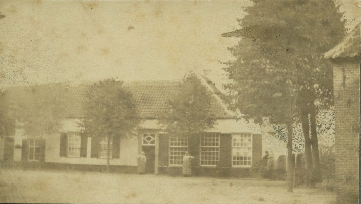 Cafe "Dorpszicht" gezien in noordelijke richting van de Dorpsstraat. Rechts is een gedeelte van de muur van de villa Prinsenhof zichtbaar.